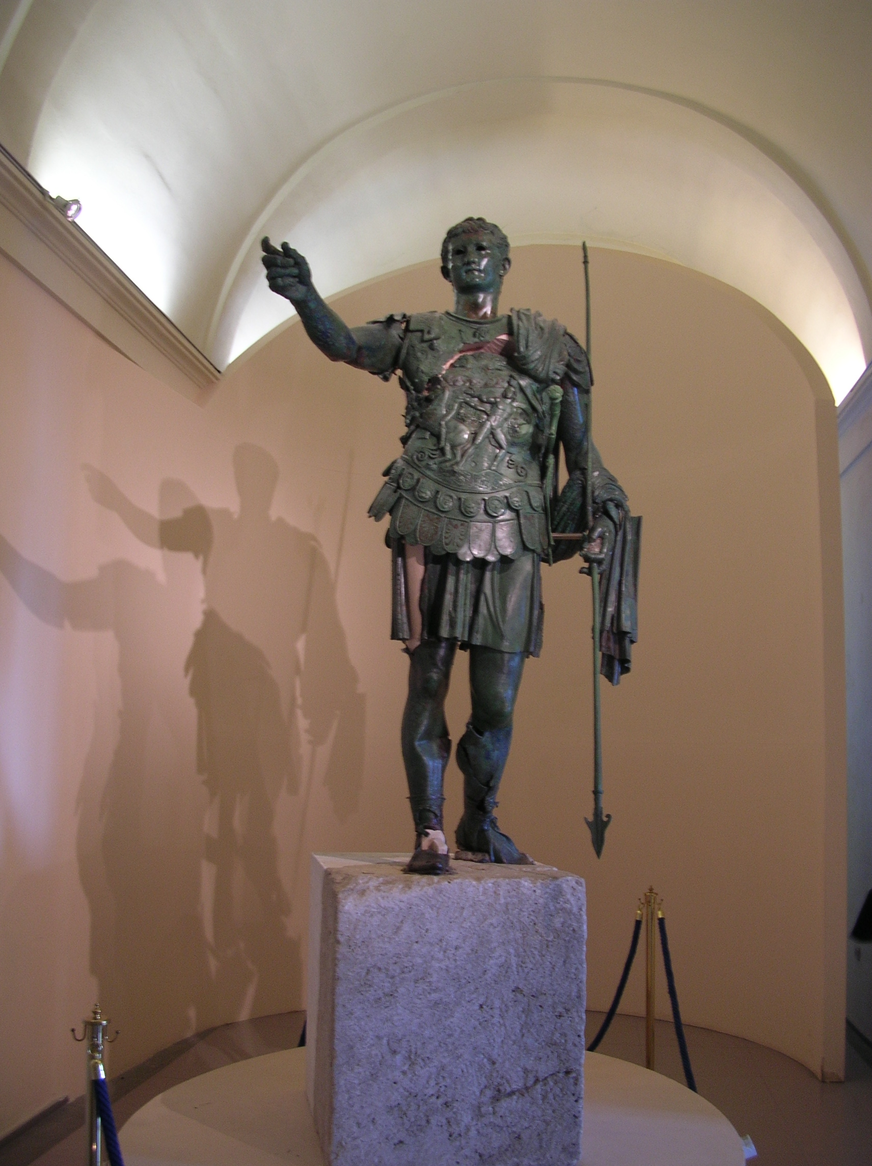 Statua rinvenuta in una antica scuola di centurioni romani e posta oggi in museo di Amelia Terni, Italy